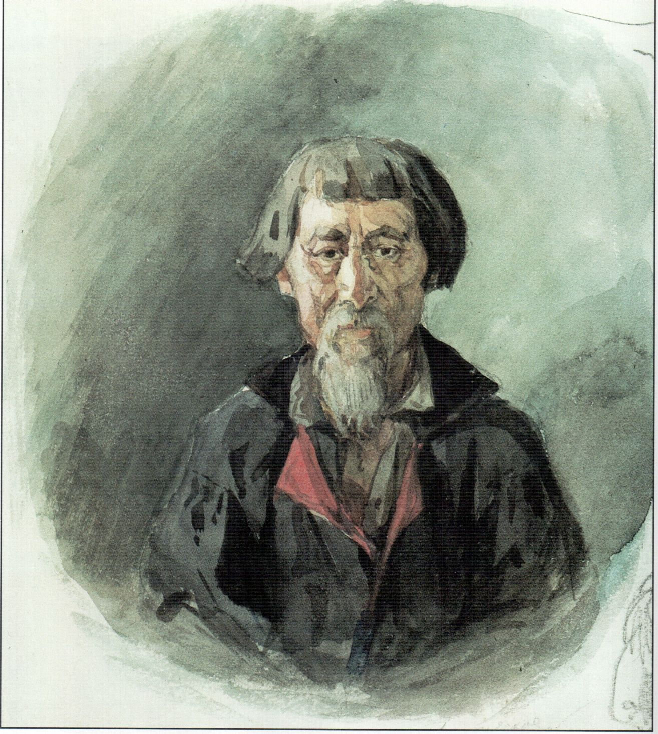 Мурза. Бумага, акварель. 23,3х32,5. Музей-усадьба В. И. Сурикова